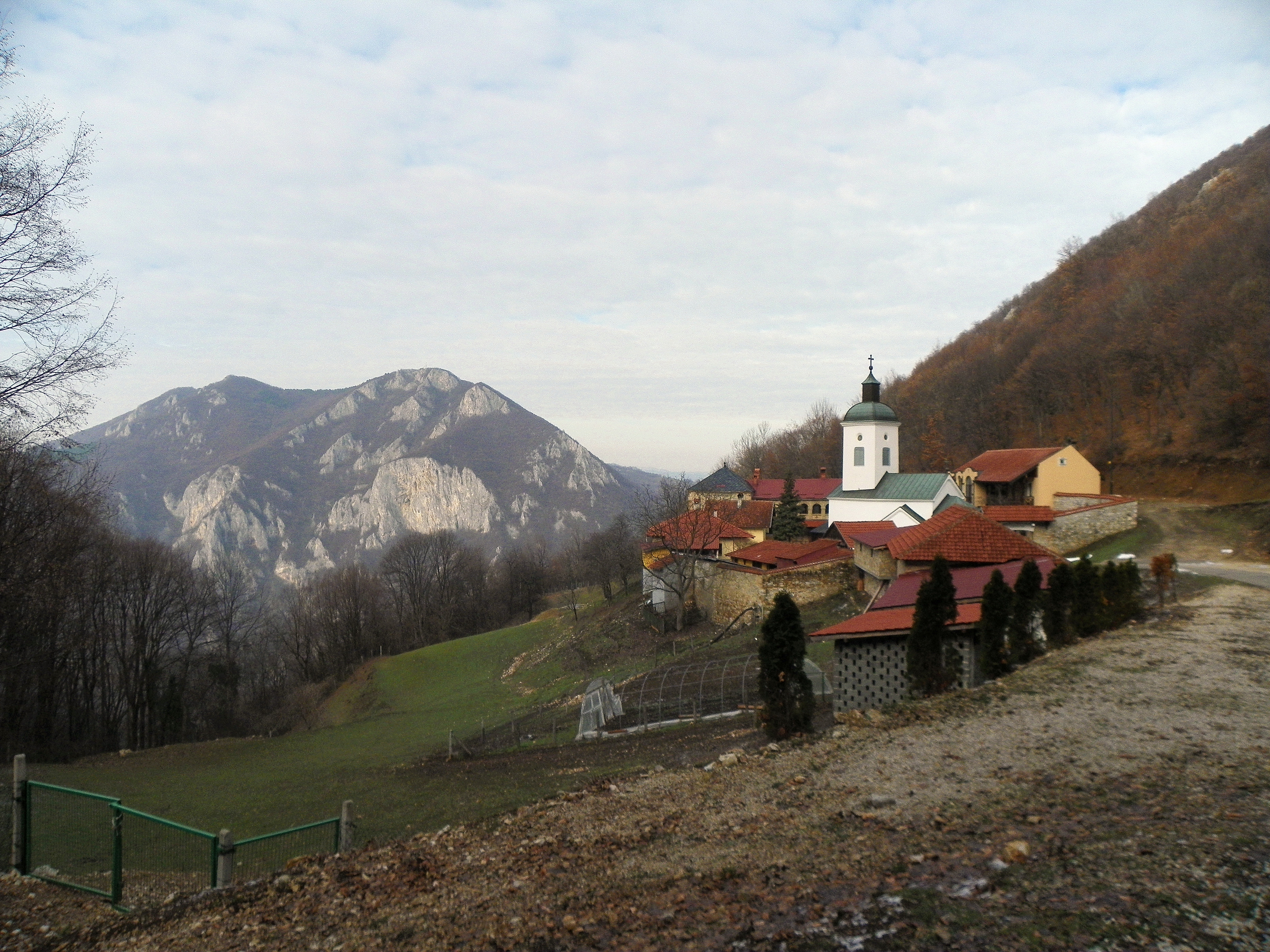 Манастир Сретење се налази у Дучаловићима, месту у општини Лучани, под самим врхом планине Овчар на 800 метара надморске висине. Манастир Сретење представља непокретно културно добро као споменик културе од великог значаја.